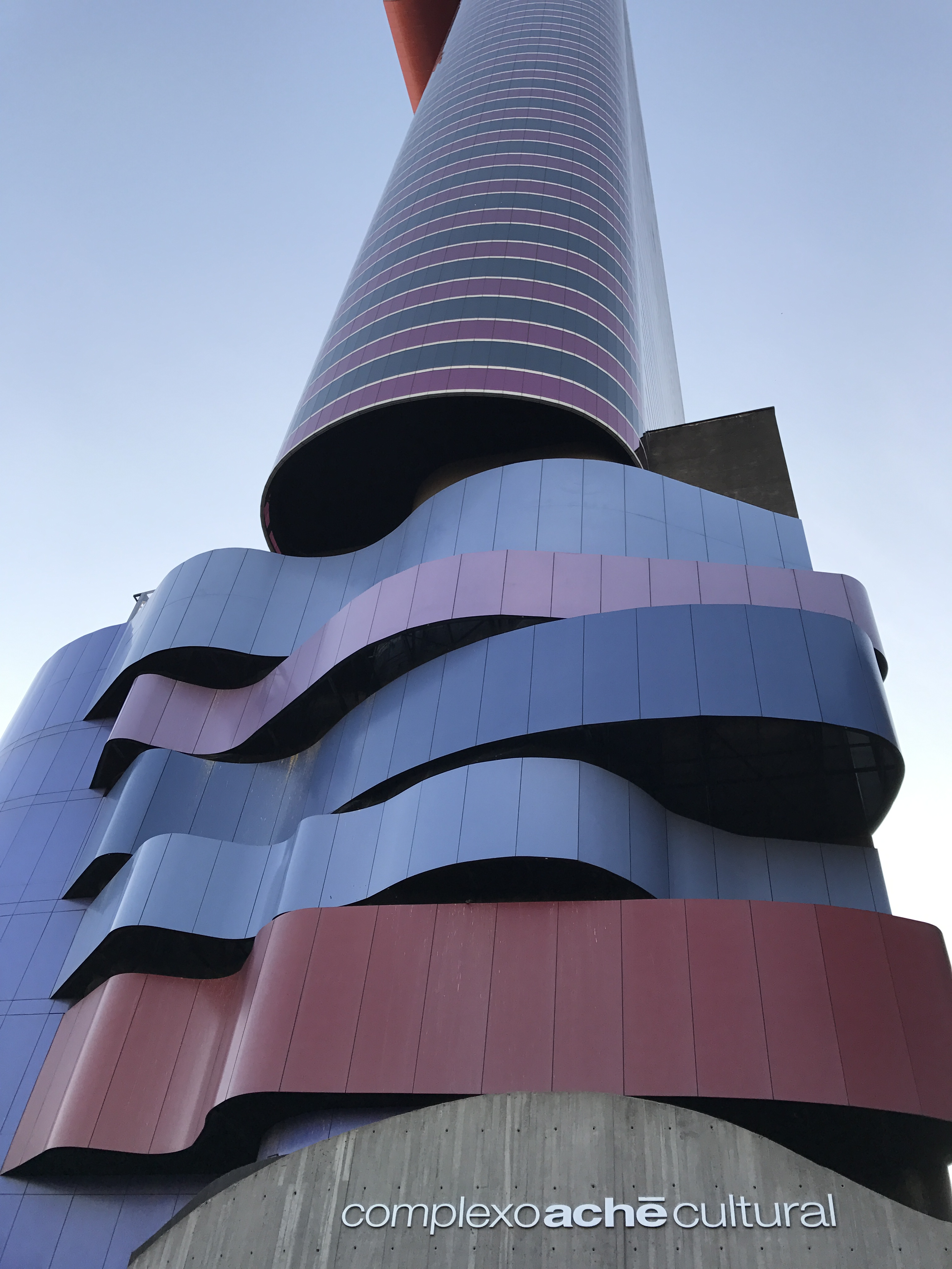 Instituto Tomie Ohtake - Complexo Ache Cultural